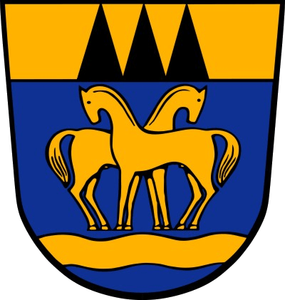 Im Schildhaupt sind durch die drei aufrechten Spitzen die drei Kirchen der Gemeinde Hilgermissen, nämlich Eitzendorf, Magelsen und Wechold, symbolisch dargestellt. Die Tingierung in Gold und Schwarz nimmt historischen Bezug auf die Wappenfarben der Grafen von Hoya, zu deren Grafschaft die Gemeinden gehörten. Die goldenen Pferde auf dem blauen Schild weisen auf die Landwirtschaft, Pferdezucht und Reiterei der Gemeinde hin. Die acht Beine sollen die acht Ortsteile der Gemeinde symbolisieren. Die goldenen Pferde stehen sich derart gegenüber, dass die Köpfe und Hälse das bekannte niedersächsische Symbol auf Bauernhäusern, den Giebelbrettern mit den nach außen gewendeten Pferdeköpfen, bilden. Das Blau bezieht sich auf die Gewässer und Seen der Gemeinde, insbesondere die Weser und den Alveser See. Der goldene Wellenbalken symbolisiert die Weser, die die ostwärtige Grenze der Gemeinde Hilgermissen bildet.